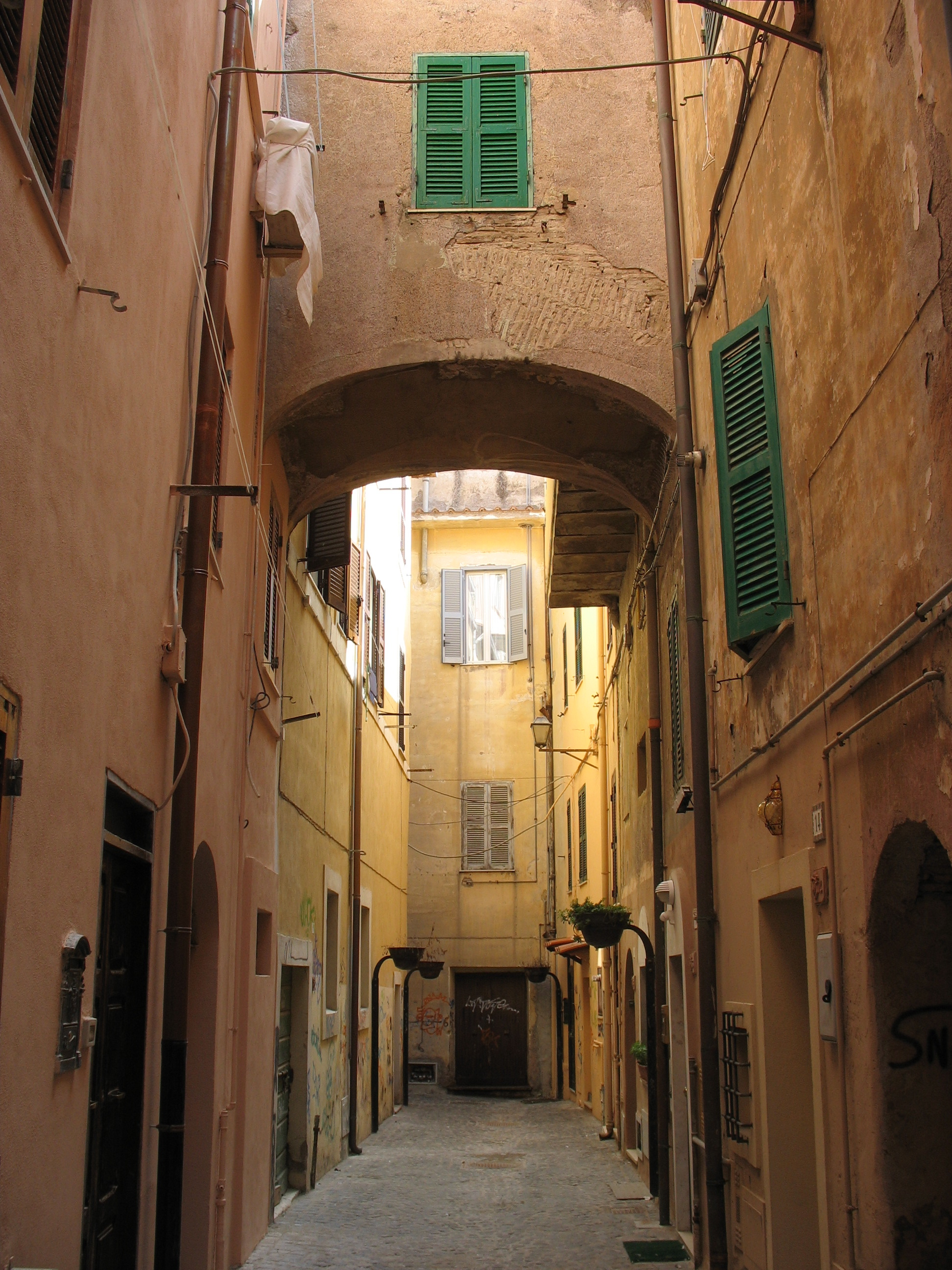 stefano, foto mie, fot città, gfdl